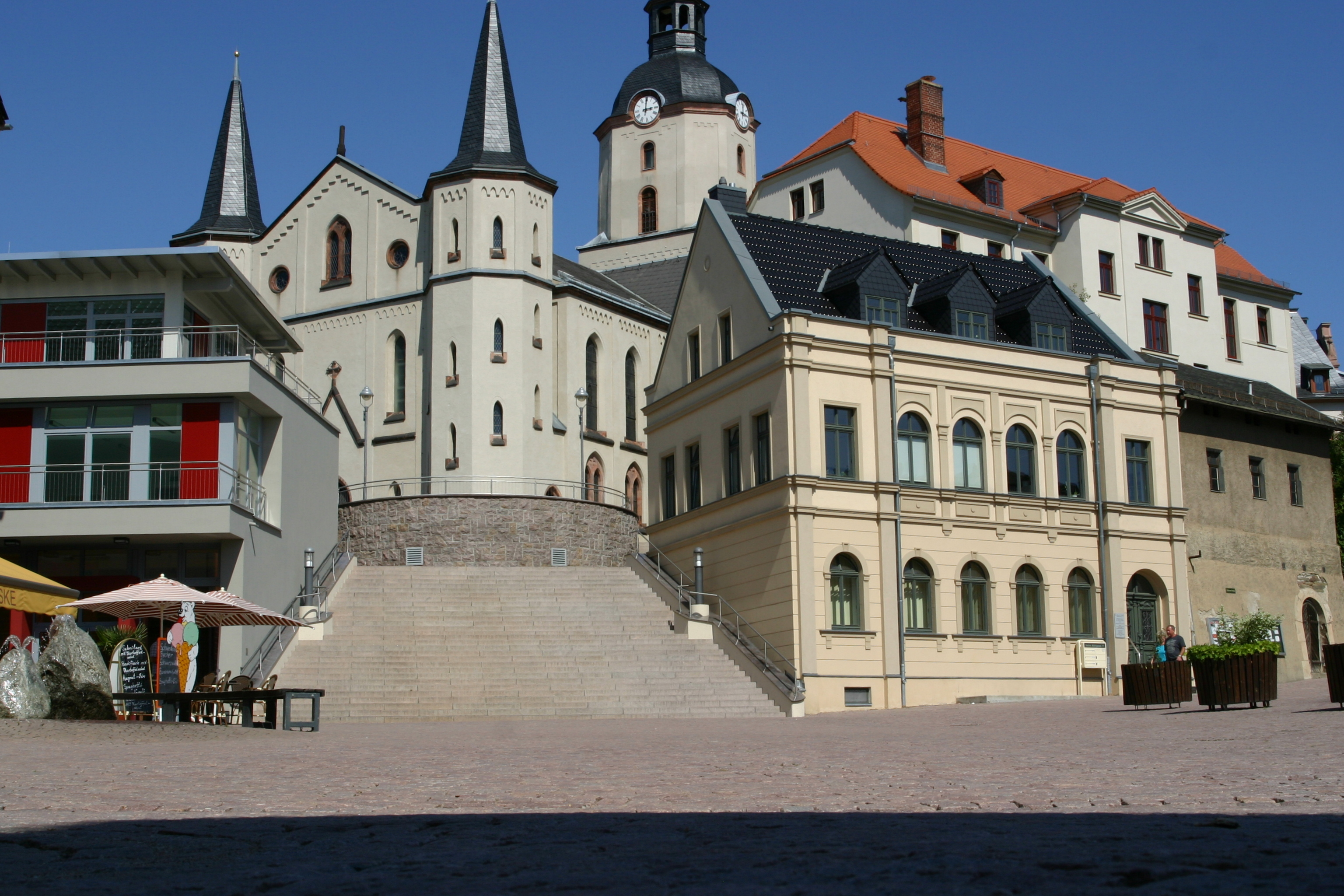 Meerane / Sachsen, Teichplatz mit Höhlermuseum und italienischer Treppe